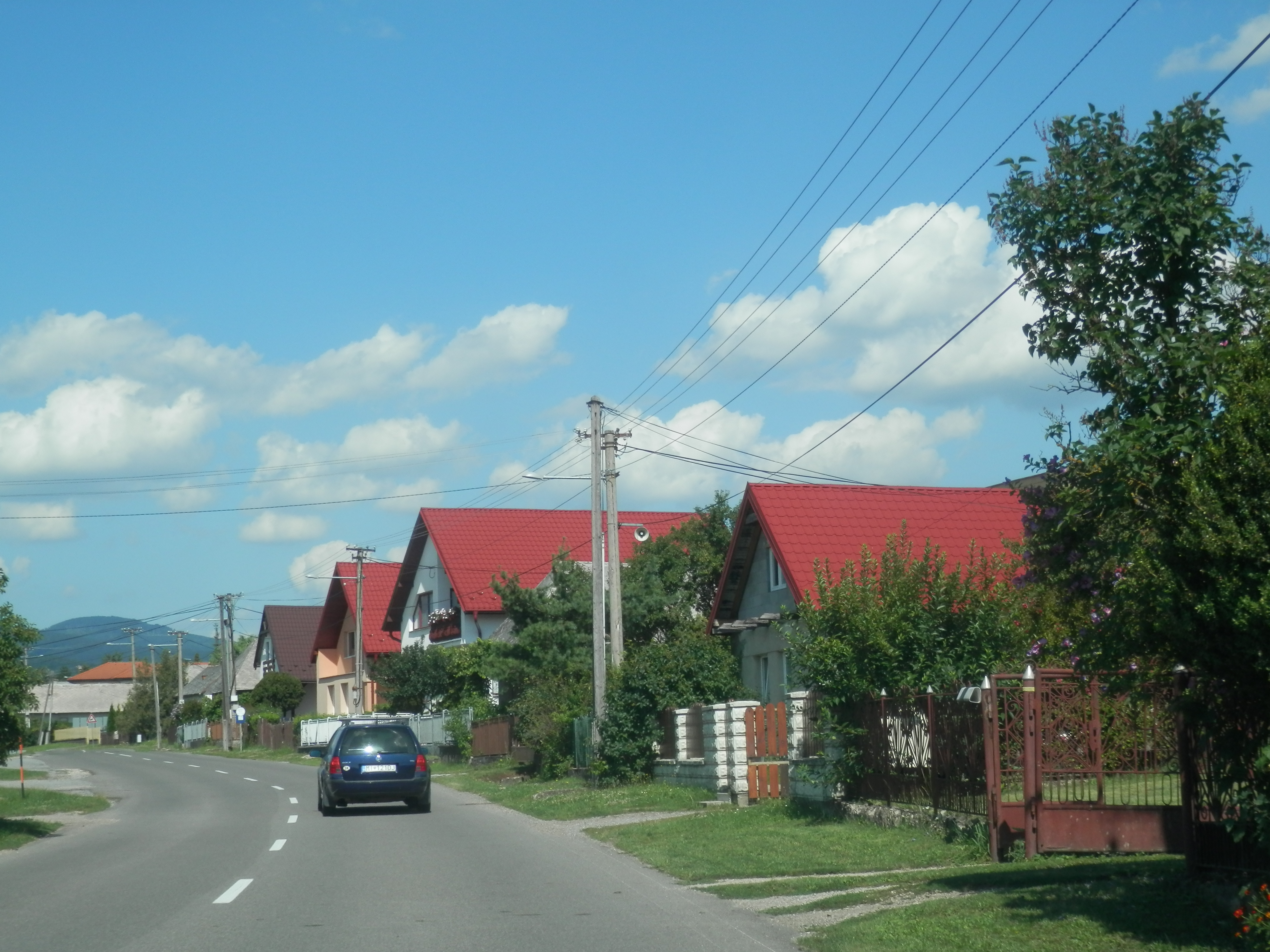 Intravilán zemplínskej obce Jovsa, okres Michalovce. Slovensko.